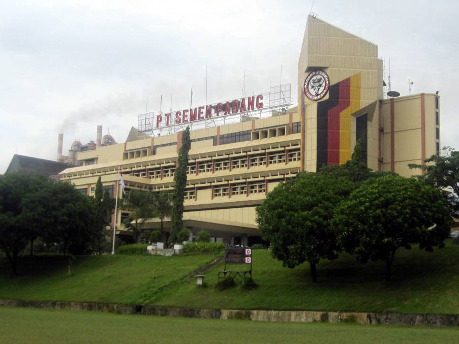 Kantor pusat PT. Semen Padang